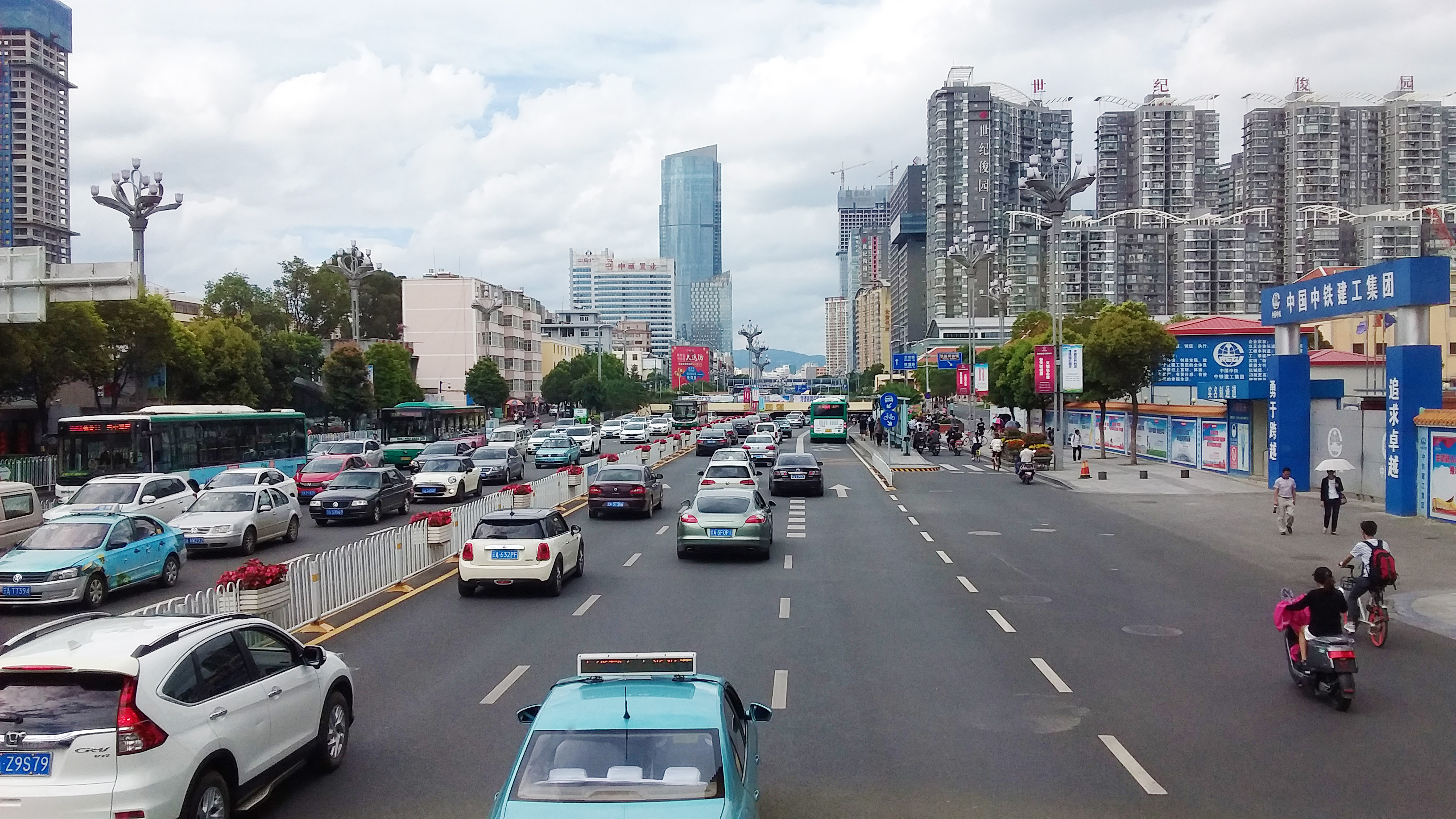 昆明北站隧道附近的北京路路段，面向北。